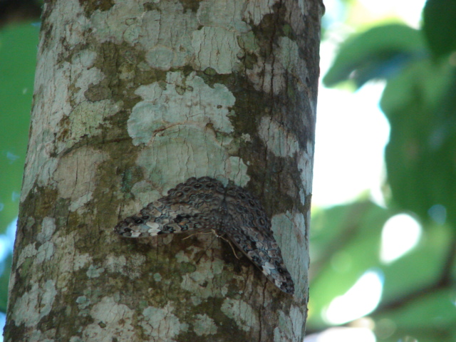 A butterfly camouflage, Petrópolis, Rio de Janeiro, Brazil